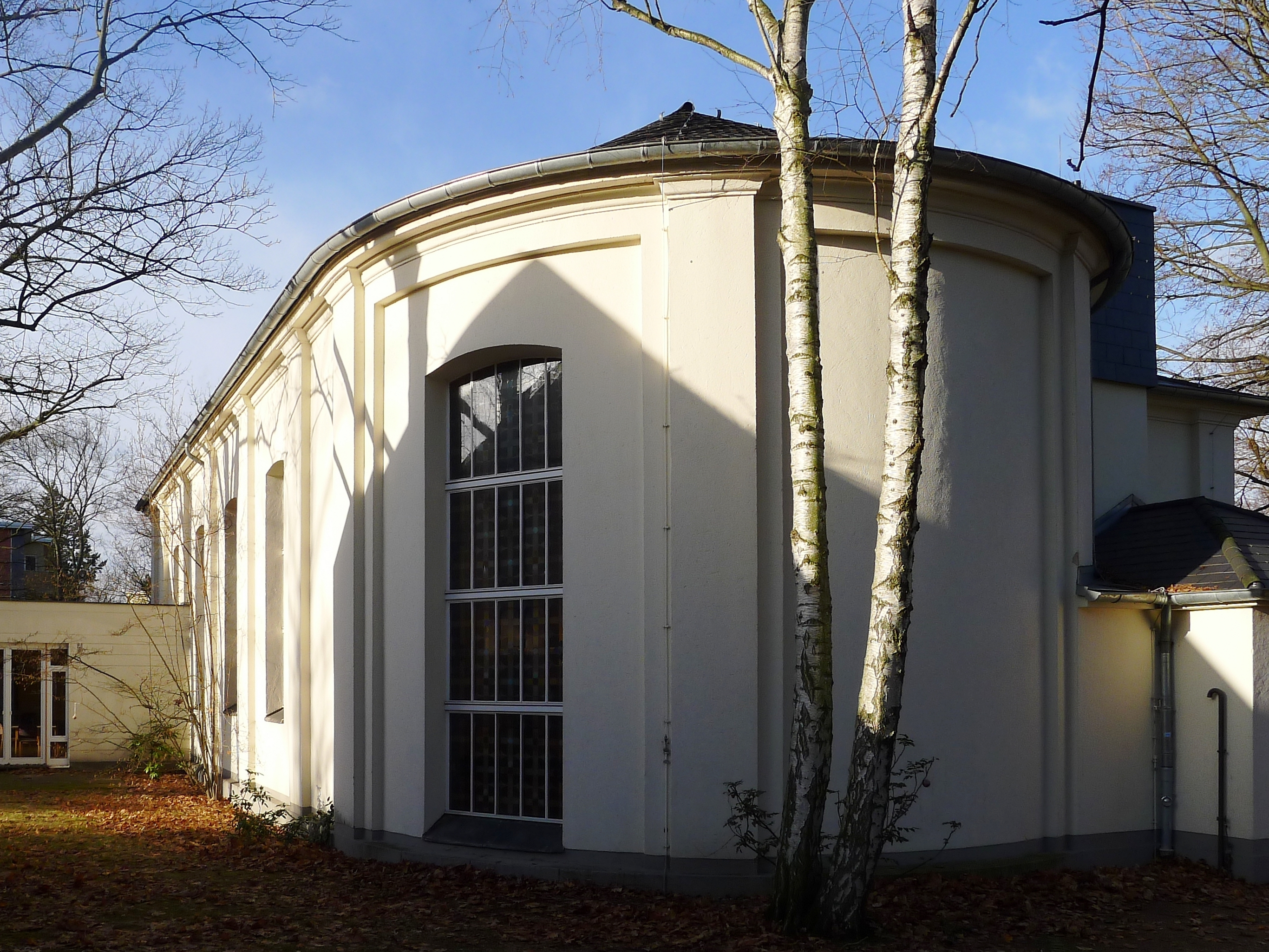 Kirchenschiff mit Apsis